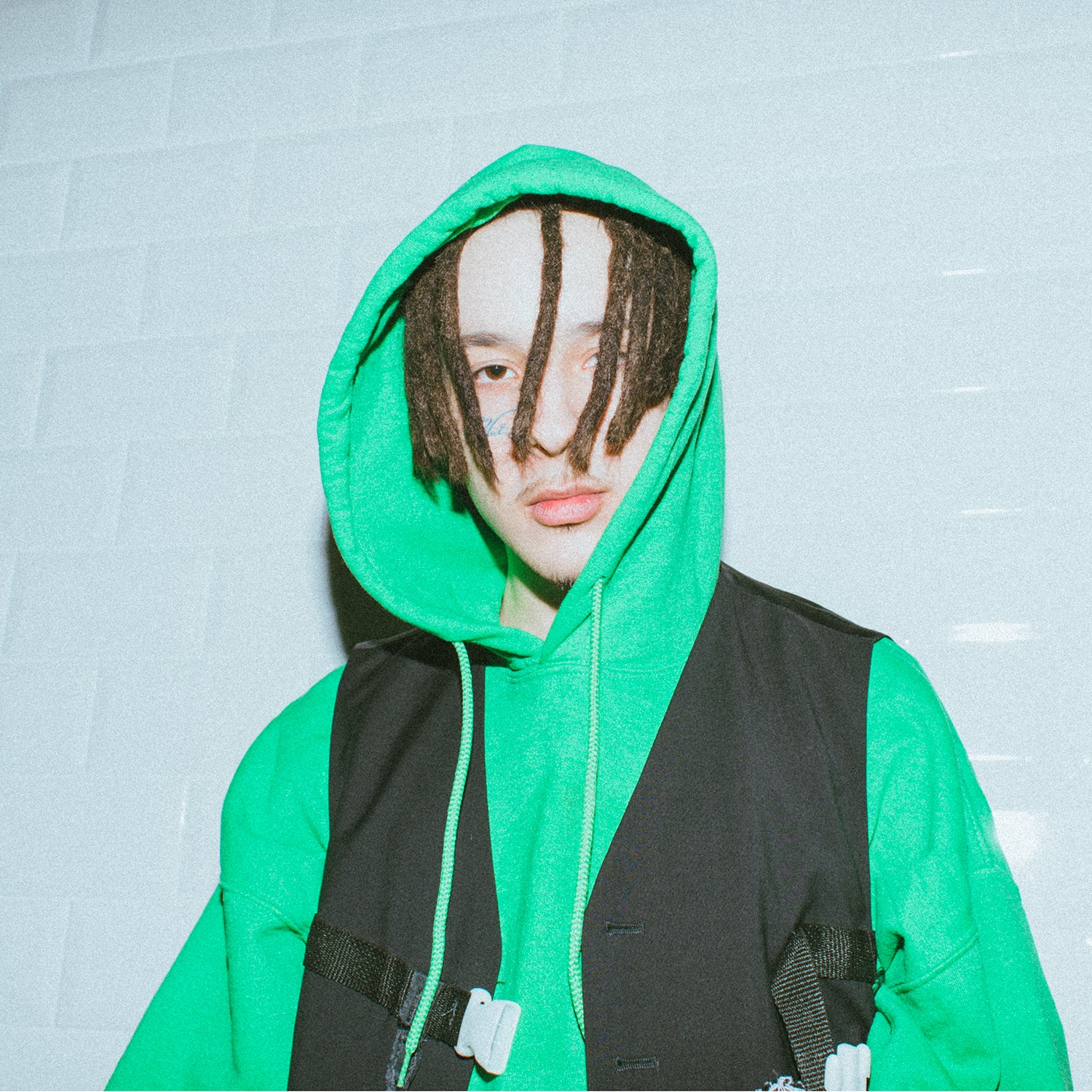 Pressefoto von Negatiiv OG